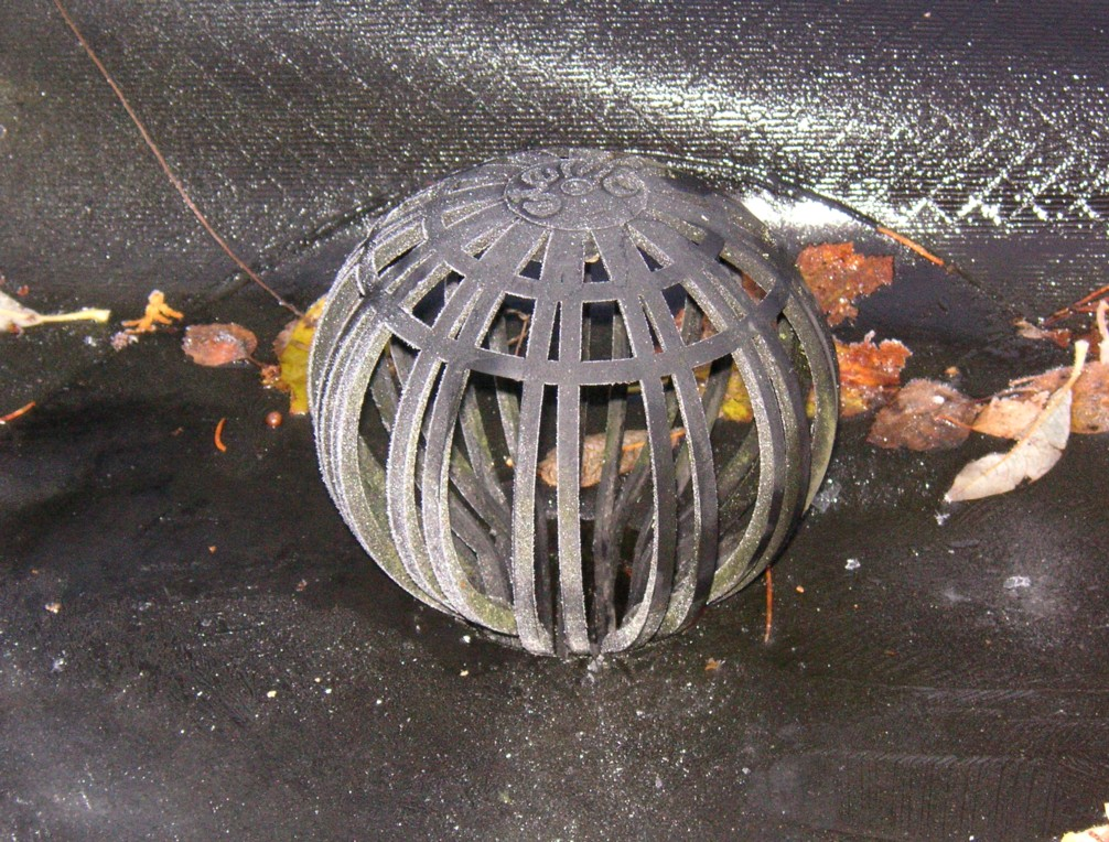 Takbrunn